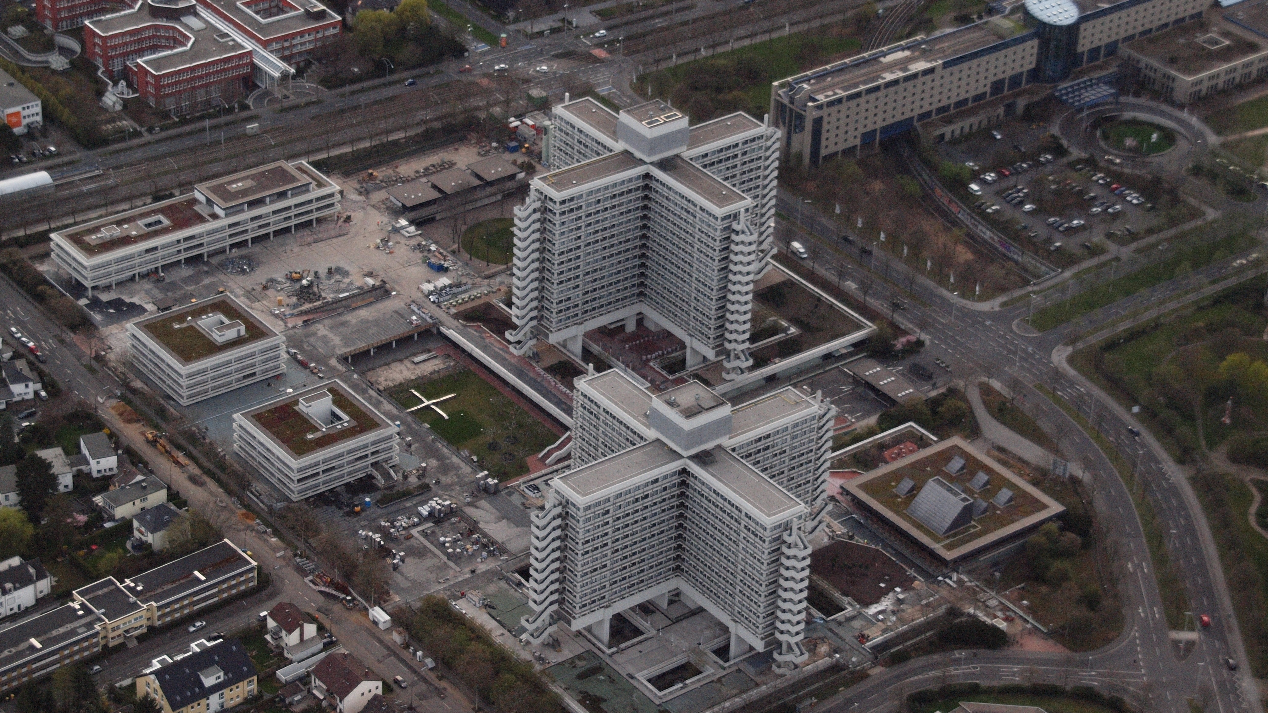 Kreuzbauten in Bonn, Ortsteil Hochkreuz: Luftaufnahme aus südöstlicher Richtung